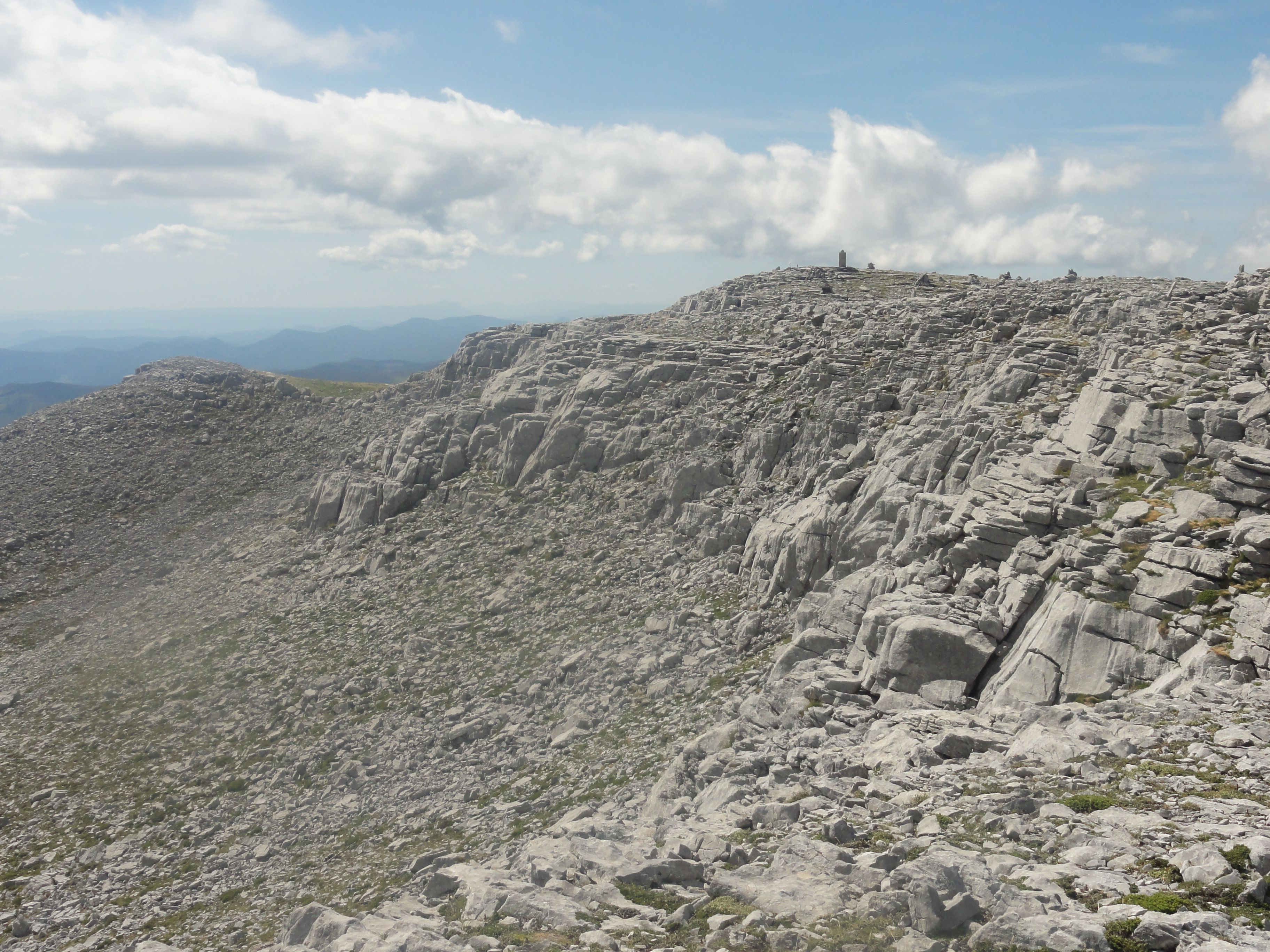 Sierra de Arrigorrieta y Peña Ezkaurre This is a photography of a Special Area of Conservation in Spain with the ID: ES0000130. Natura2000 entry, EEA entry